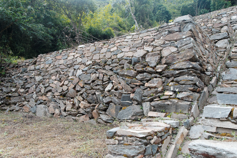 Detail d'une terrasse agricole sur le site de Choquequirao